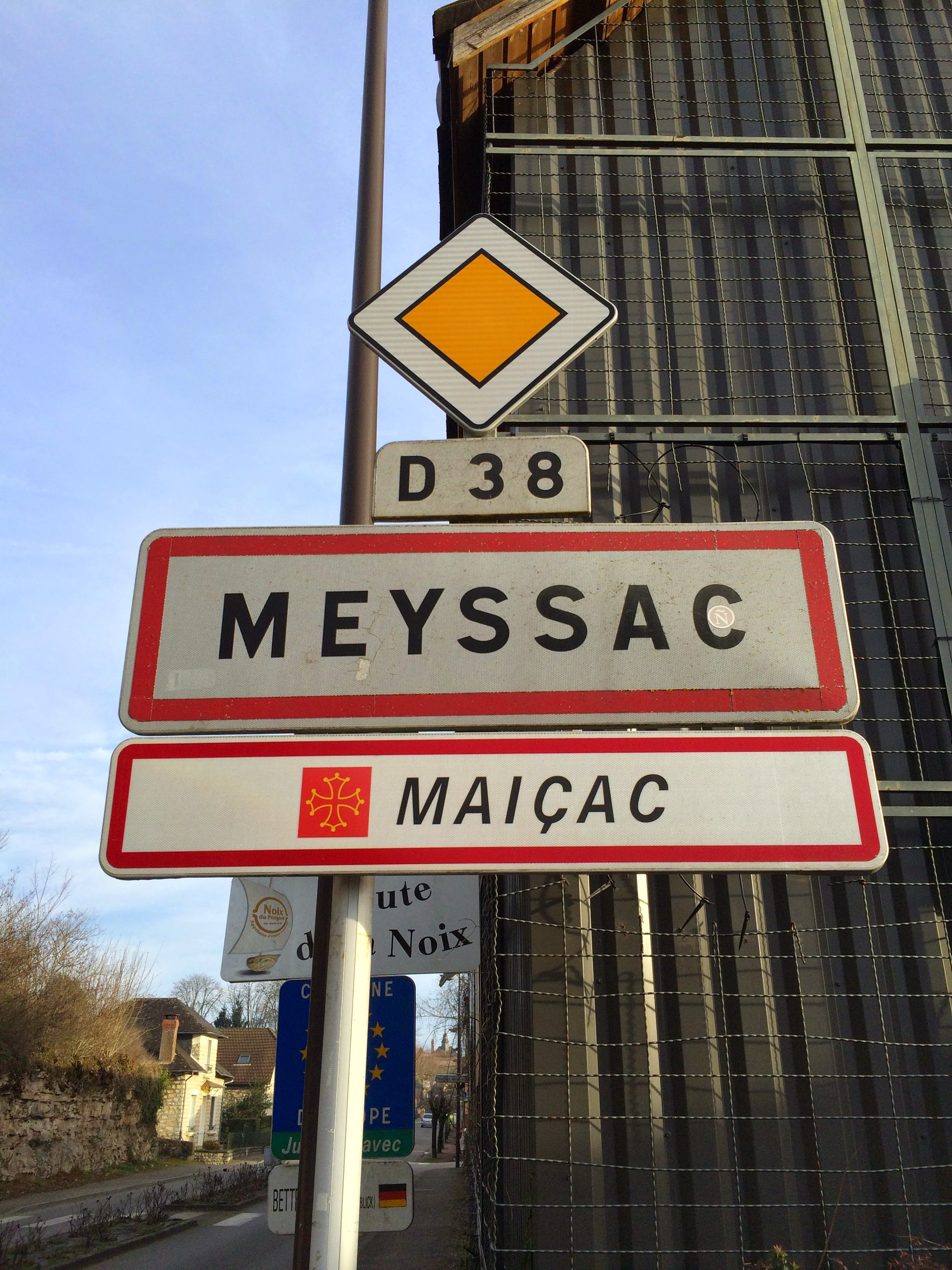 Panèl d'intrada de Maiçac.